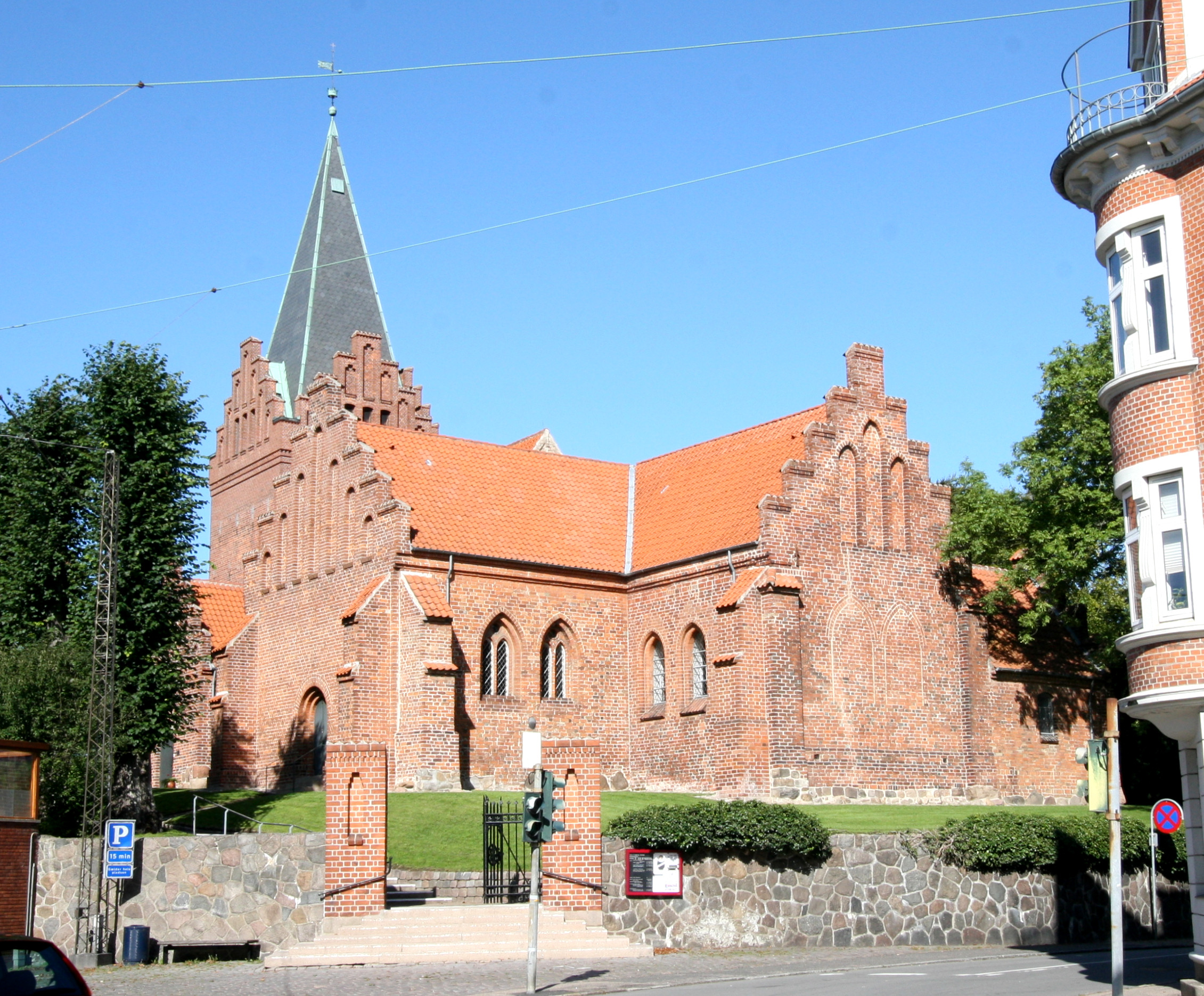 Sankt Peders Kirke in Slagelse, Denmark. From southeast